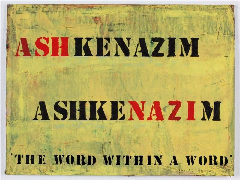 Painting